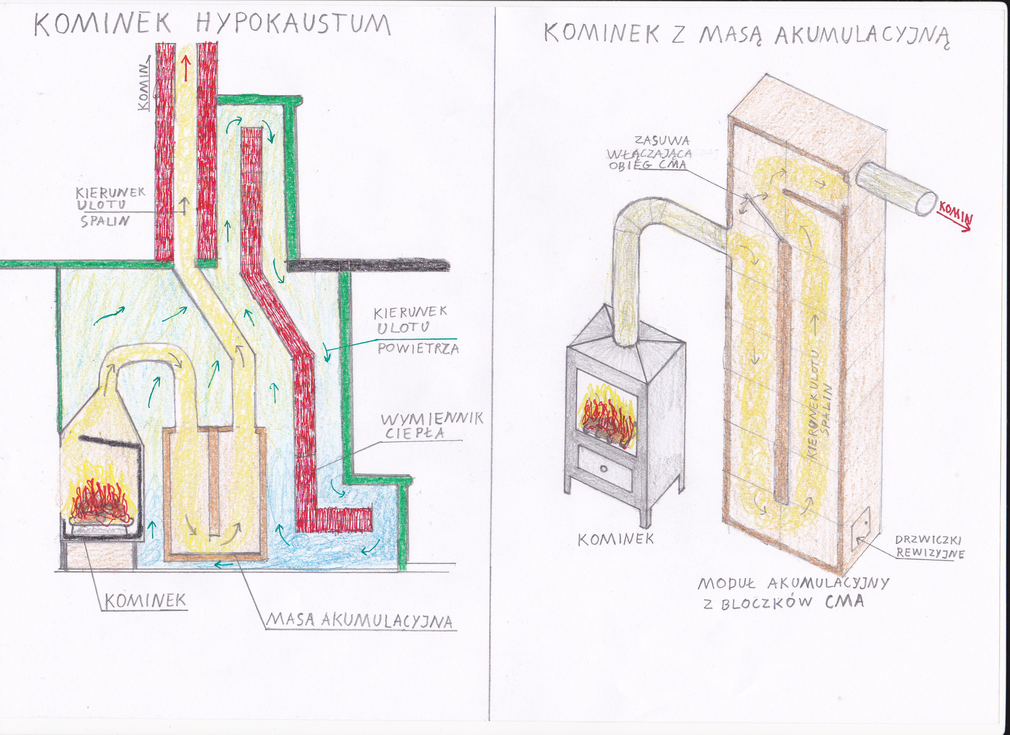 szkic wykonany własnoręcznie